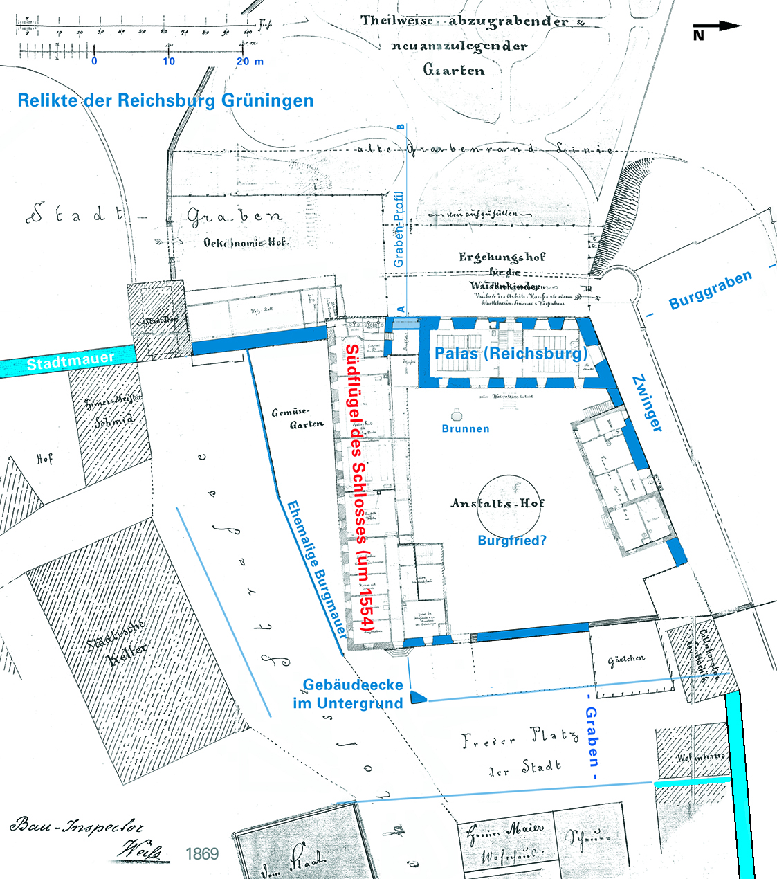 Relikte der Reichsburg Grüningen blau hervorgehoben im Lageplan von Bau-Inspector Weiß (1869 zum Umbau in ein Lehrerinnen-Seminar mit Waisenhaus erstellt)